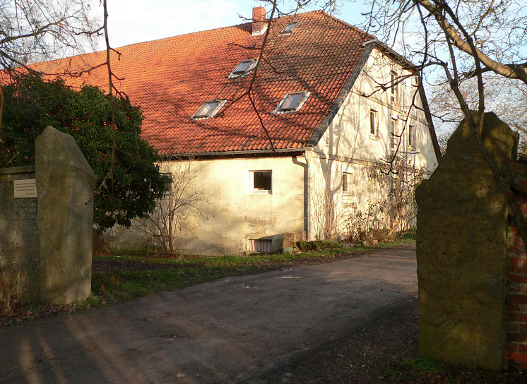 Adolphshof